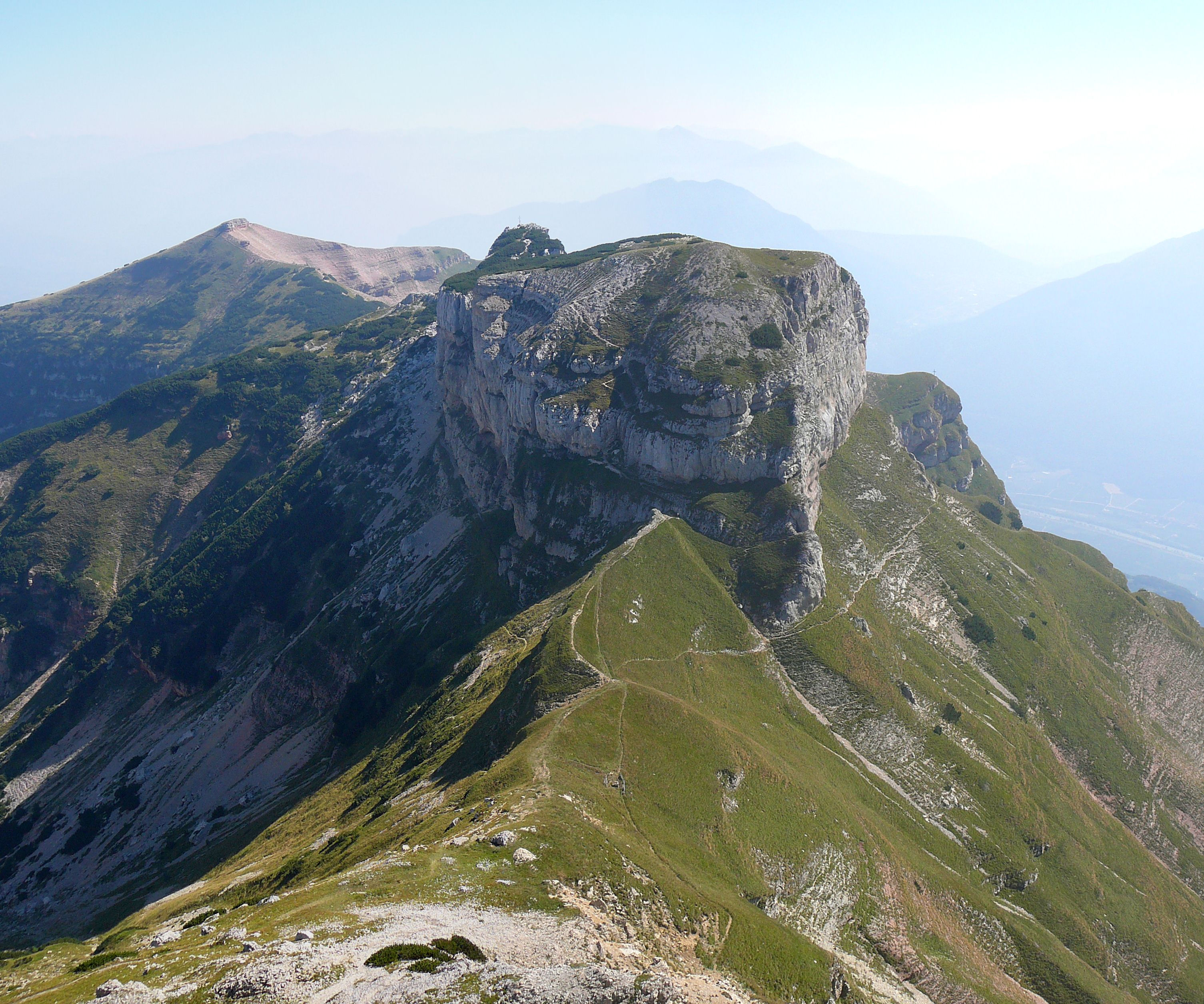 Dos d'Abramo